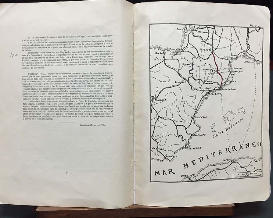 Foto del Mapa itinerari marítim transpirineu